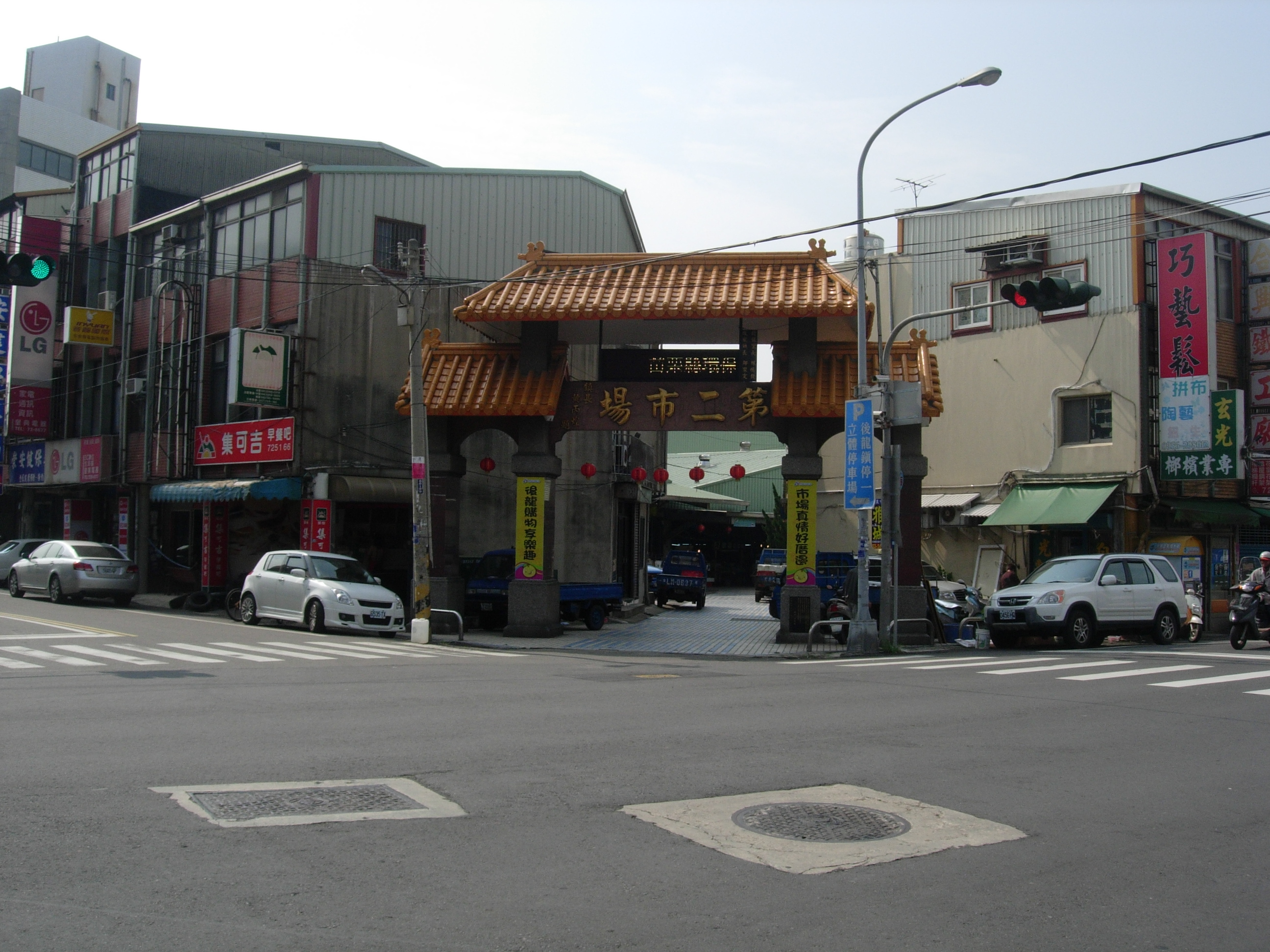 中文（台灣）: 後龍第二市場